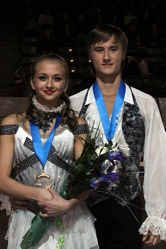 Виктория Синицина и Руслан Жиганшин на финале Гран-при среди юниоров сезона 2011-2012